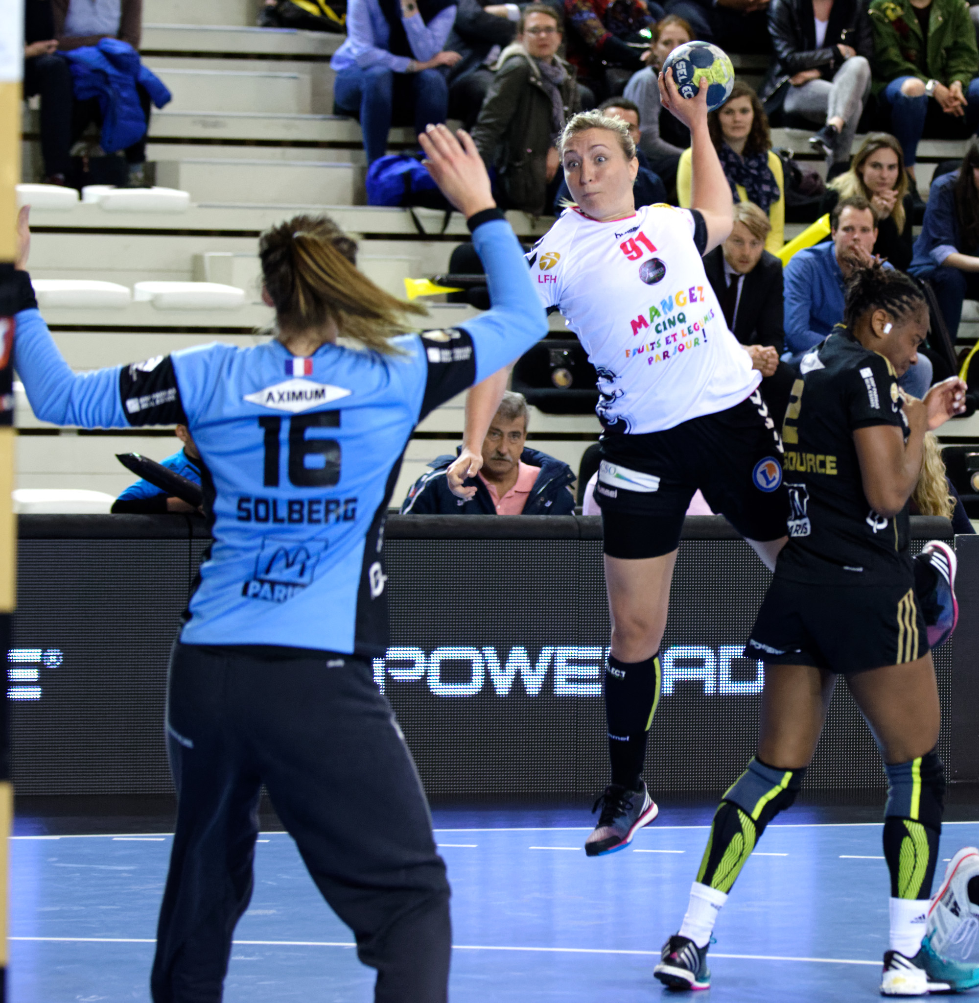 Rencontre de demie-finale de coupe de France entre Issy Paris et Brest. A Issy les Moulineaux, le 26 avril 2017.